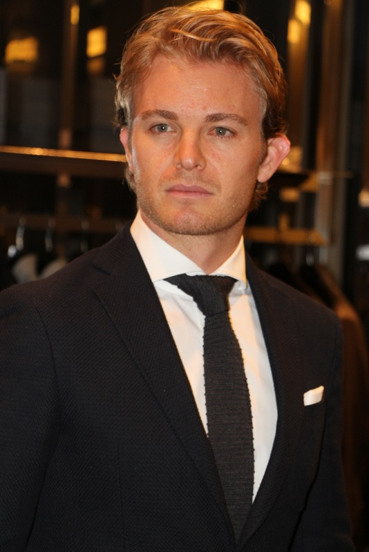 Nico Rosberg-008